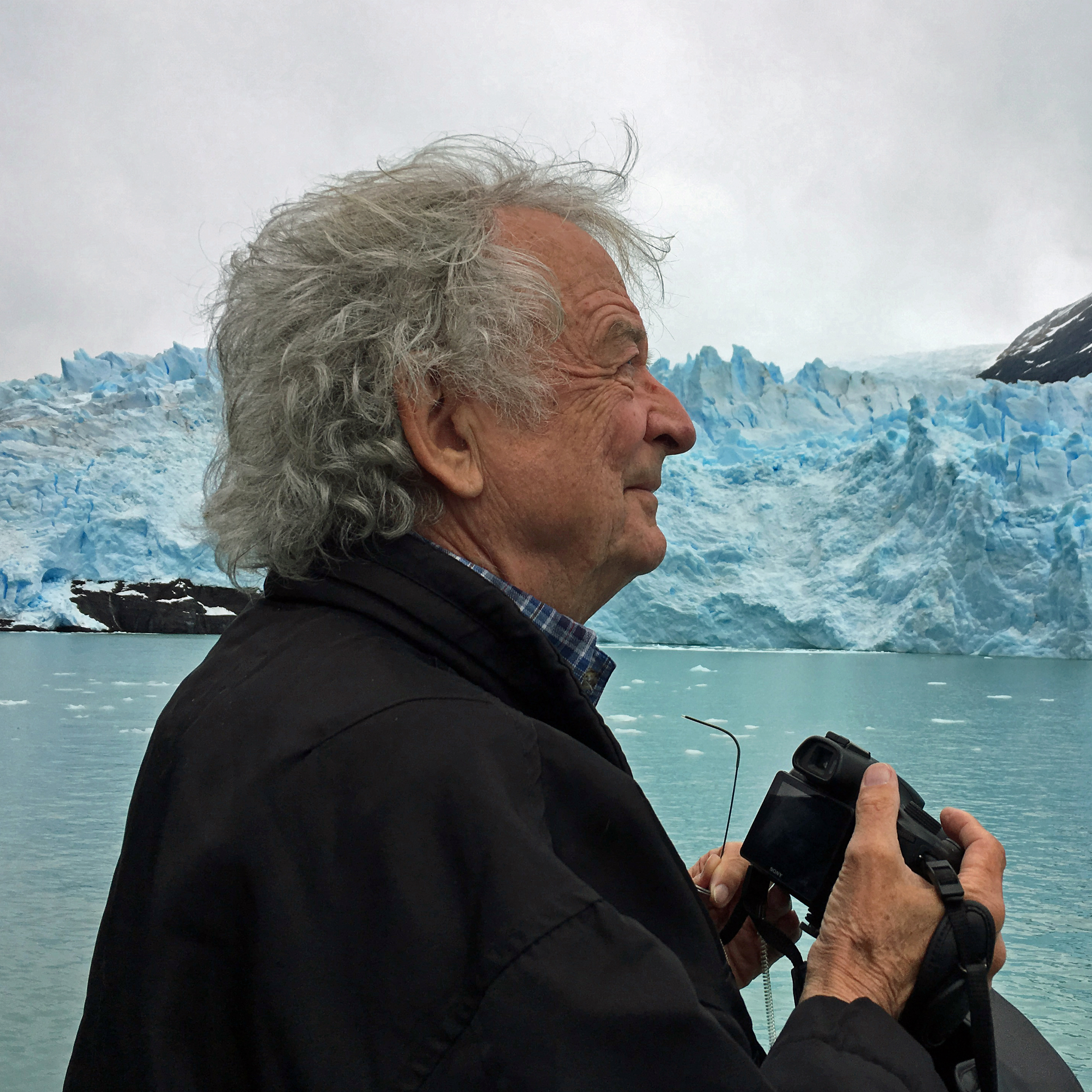 Portrait S. Gahse